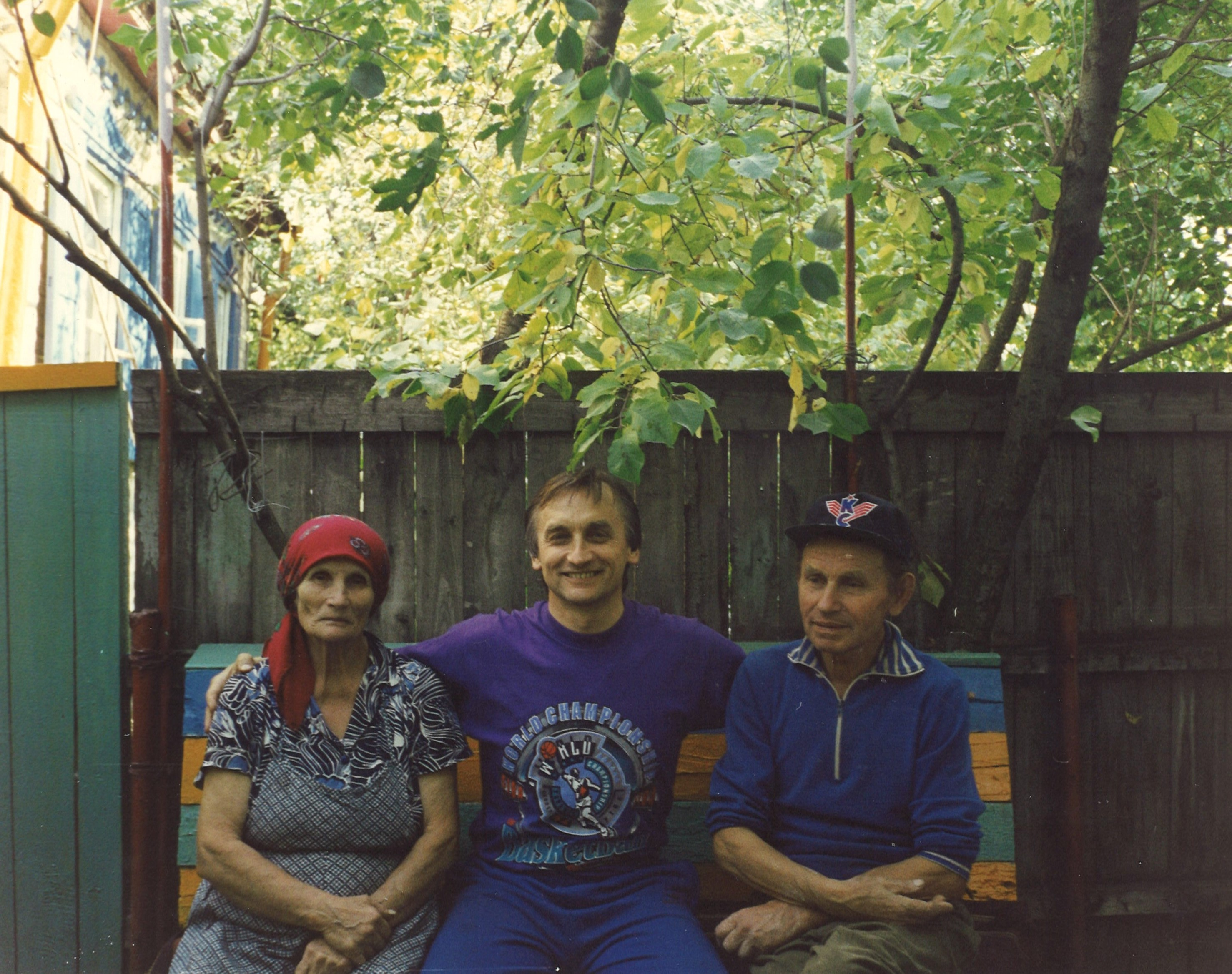 Фотография из личного архива, В.А. Авраменко с родителями